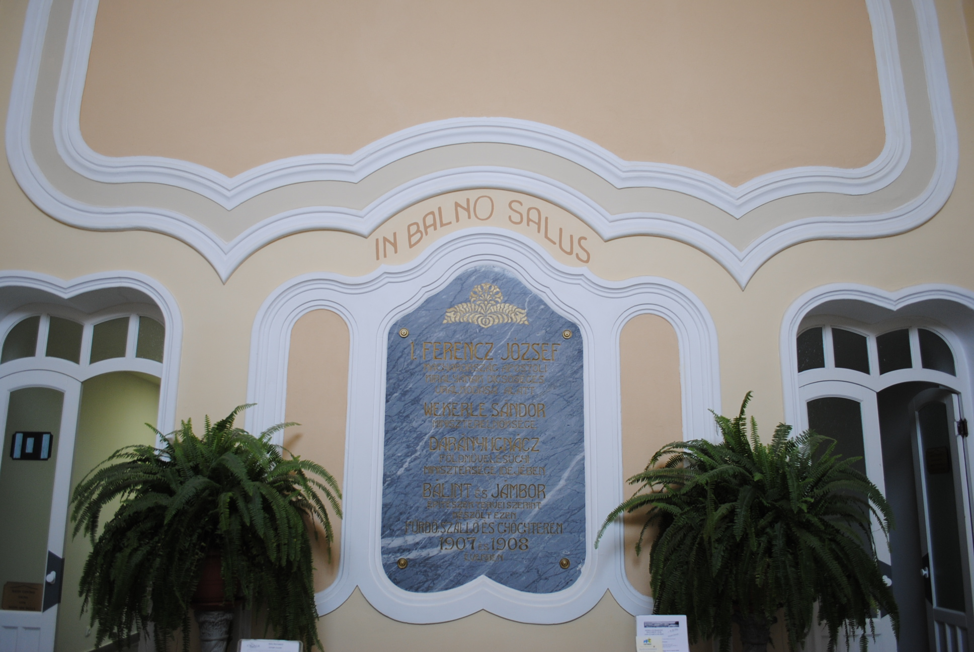 Pavilionul băilor, 1907